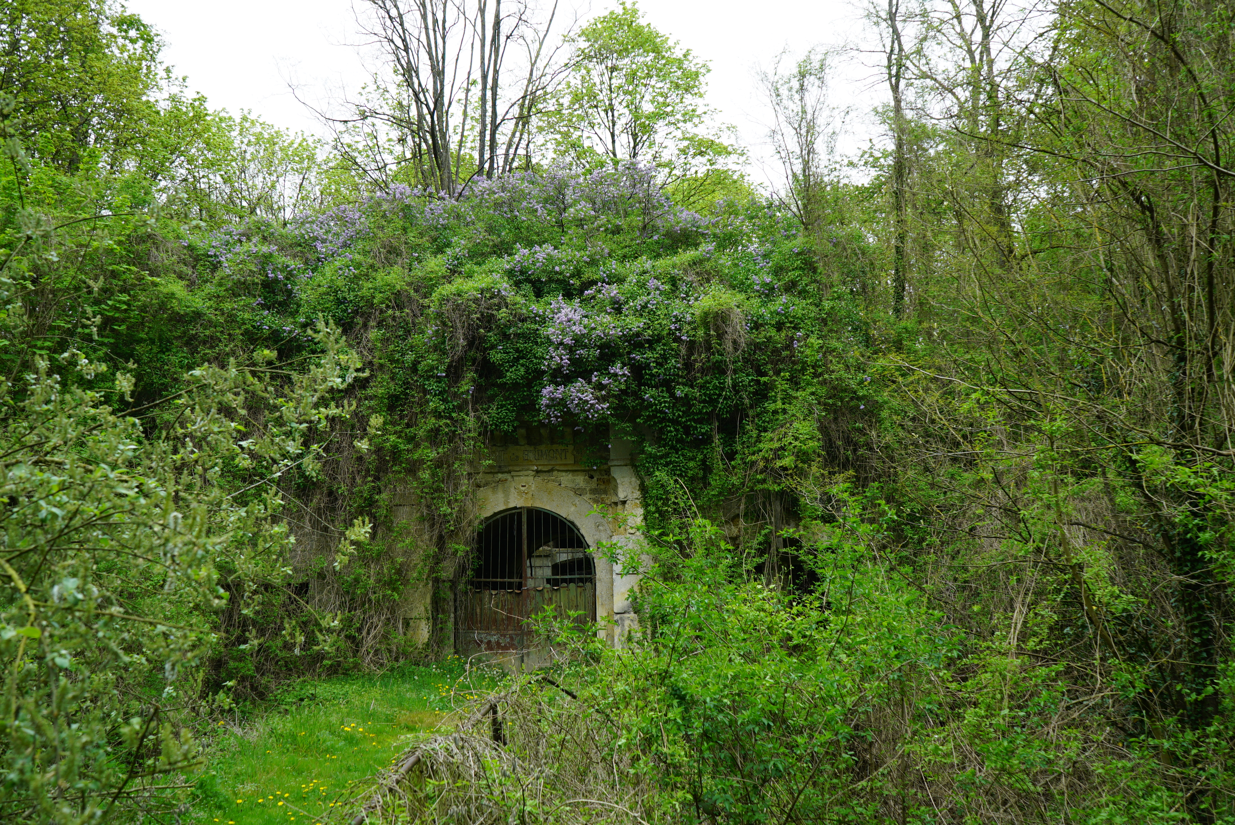 vue de l'état actuel du Fort de Brimont.